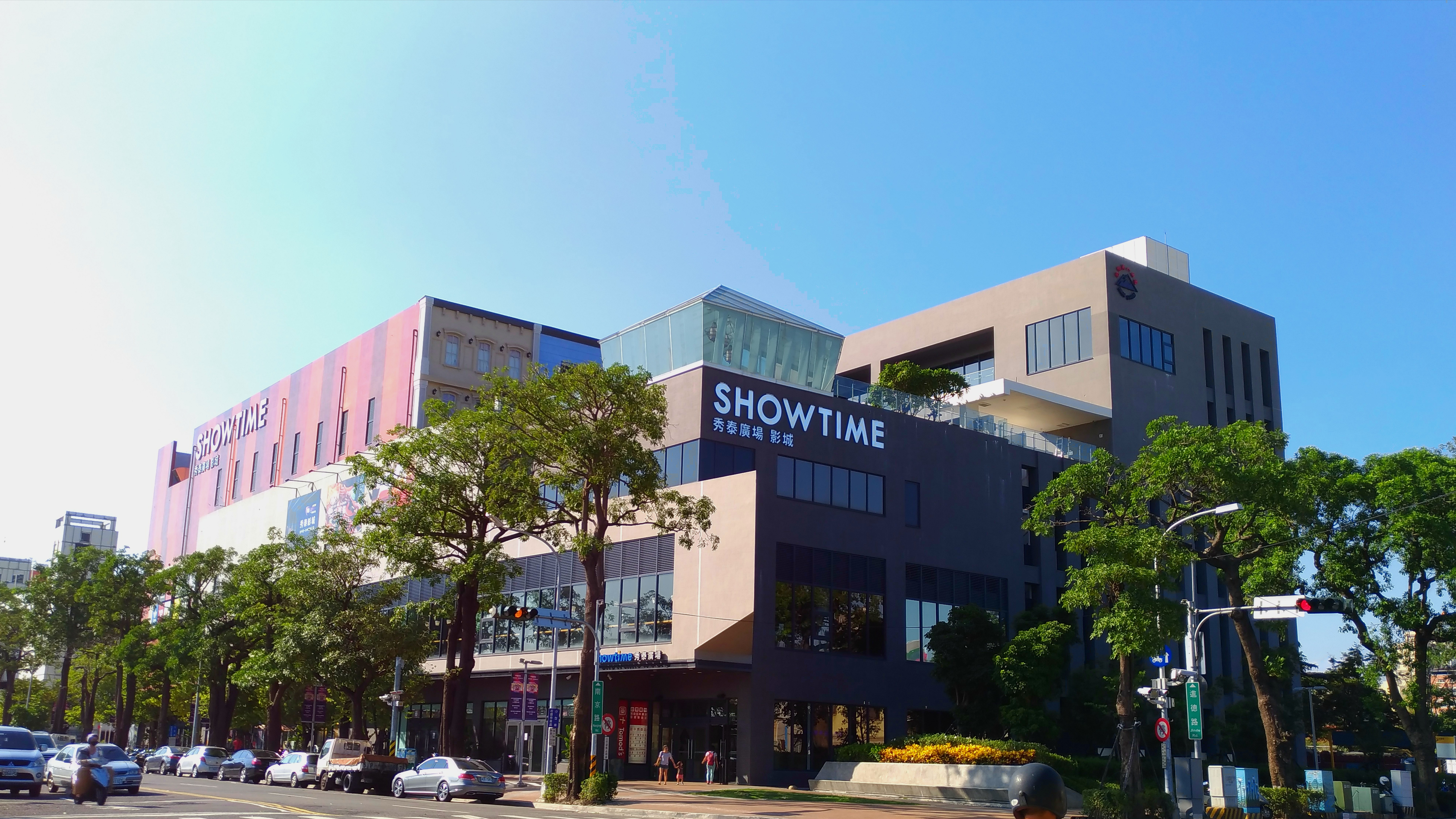 中文（台灣）: 台中秀泰廣場站前店S2館